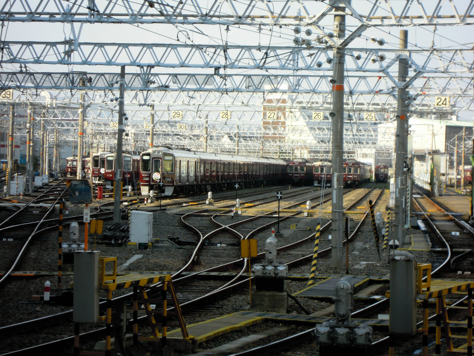 Hankyu Railway Depot Syojaku